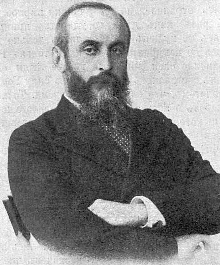 Алексей Александрович Бобринский